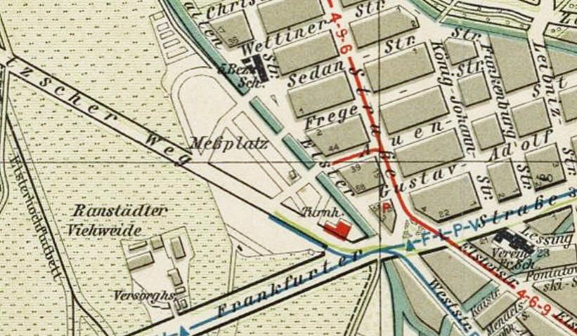 Bereich des Meßplatzes in Leipzig, auf dem von 1907 bis 1935 die Leipziger Kleinmesse stattfand. Ausschnitt aus einem Stadtplan von 1914.